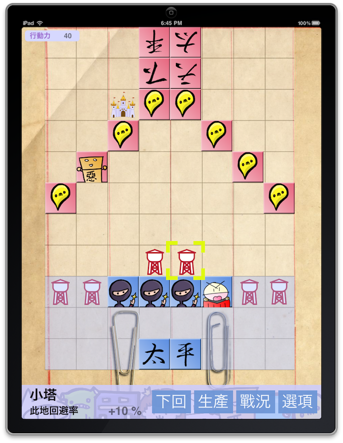 天下太平大戰 iPhone/iPad App 遊戲畫面